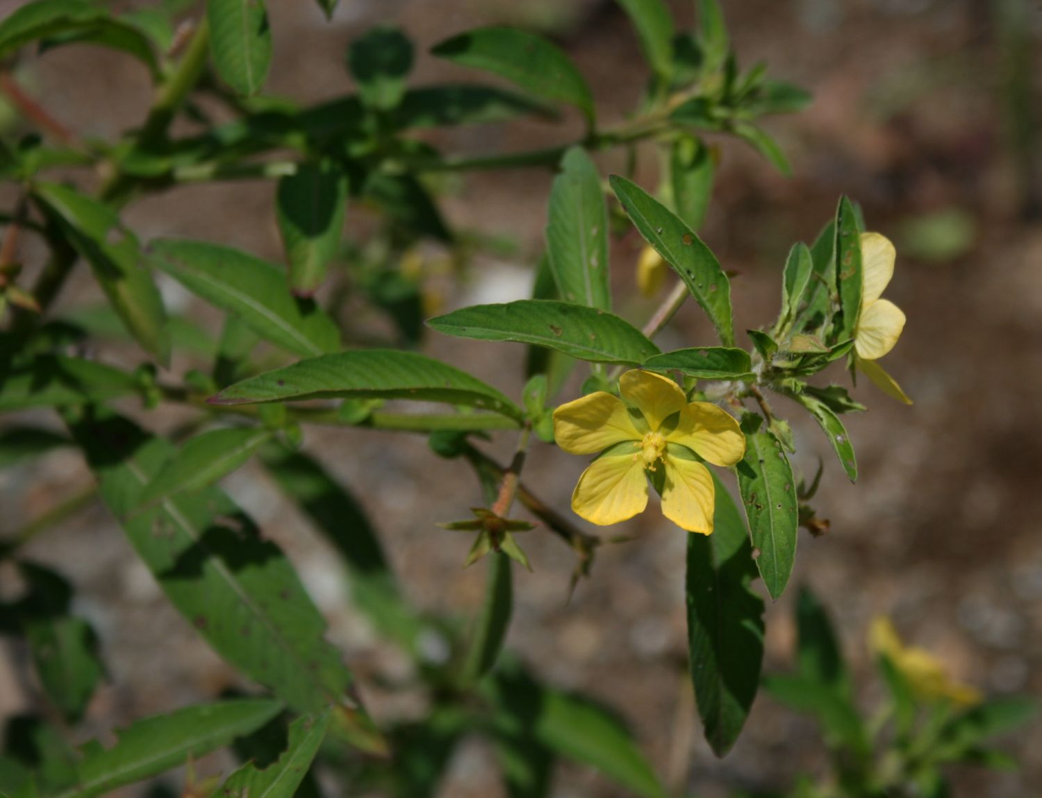 Ludwigia leptocarpa, Nachtkerzengewächse (Onagraceae) - Costa Rica: Prov. Puntarenas, La Gamba NW Golfito, Valle Bonito